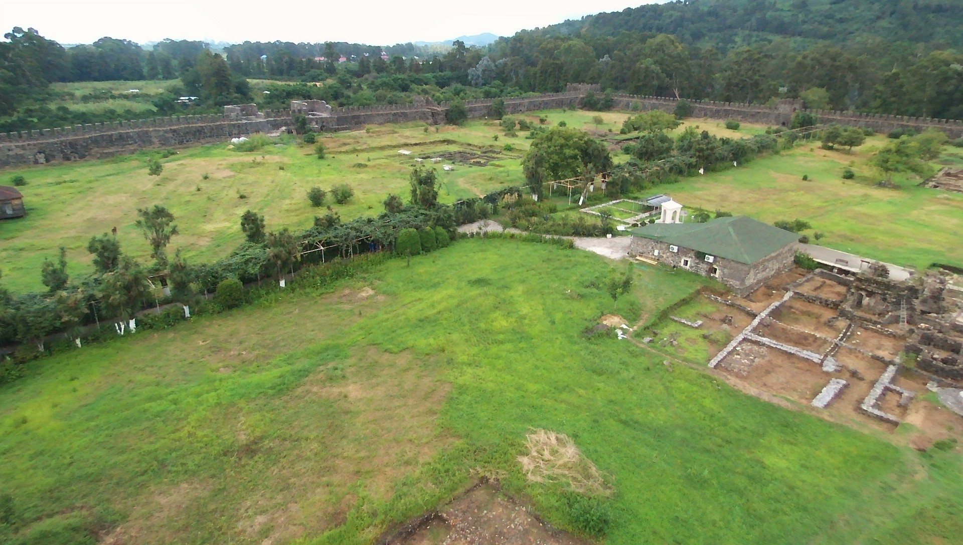 Ten materiał wykonano dronem Parrot Bebop Drone dzięki współpracy z firmą Parrot Polska. Materiały wykonane tym sprzętem możesz zobaczyć w kategorii: Taken with Parrot Bebop Drone. English | polski | +/− The making of this document was supported by Wikimedia Polska. To zdjęcie zostało wykonane podczas Wikiwyprawy 2015. Wszystkie zdjęcia z wyprawy możesz zobaczyć w kategorii: Wikiwyprawa 2015. English | polski | +/− To zdjęcie zostało załadowane dzięki współpracy z firmą Hyperbook. polski | +/− To zdjęcie zostało załadowane dzięki współpracy z firmą: Kopex Group. English | polski | +/−